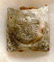 Plombe des Münzschatzes von Lüneburg